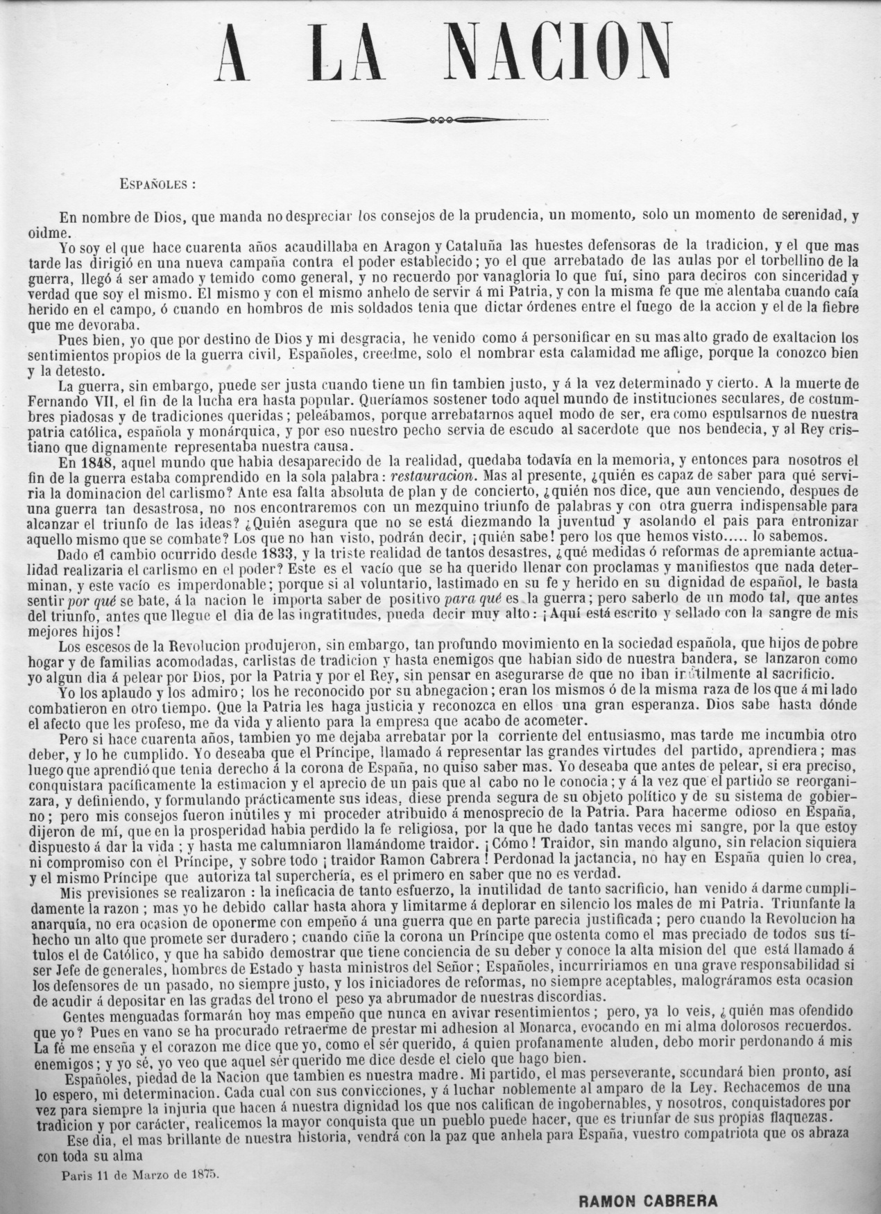 A la Nación